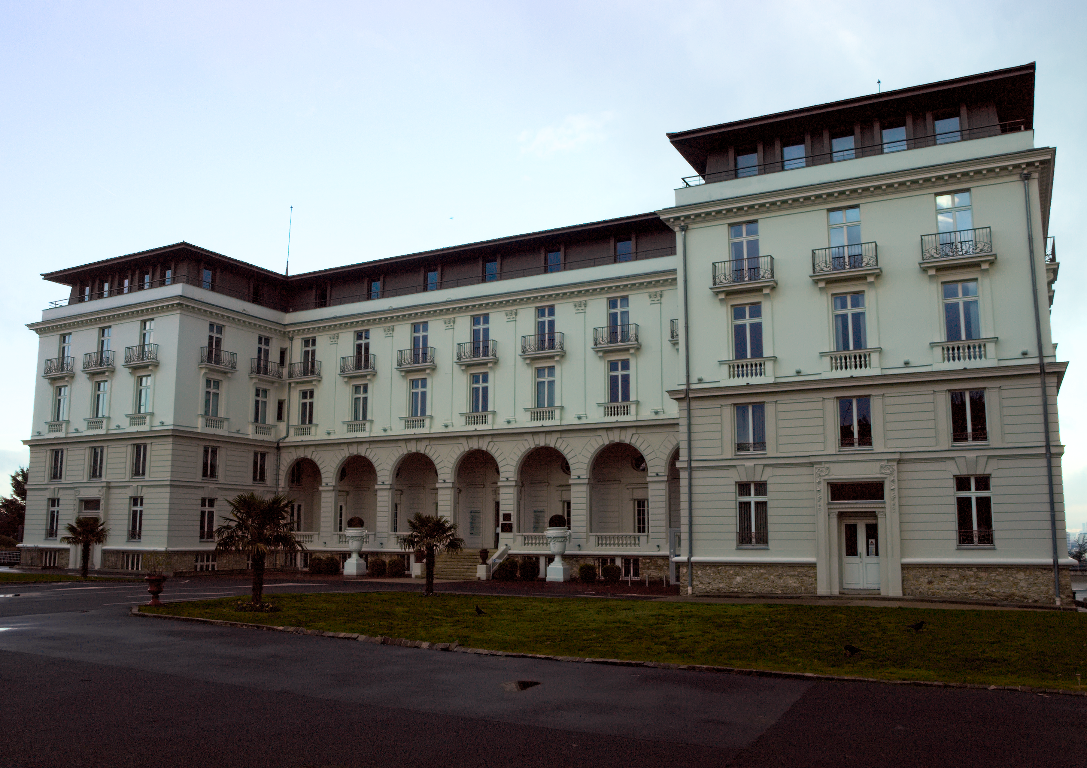 Le Pavillon de Bellevue, aujourd'hui administré par le CNRS, a abrité l'Office des Inventions